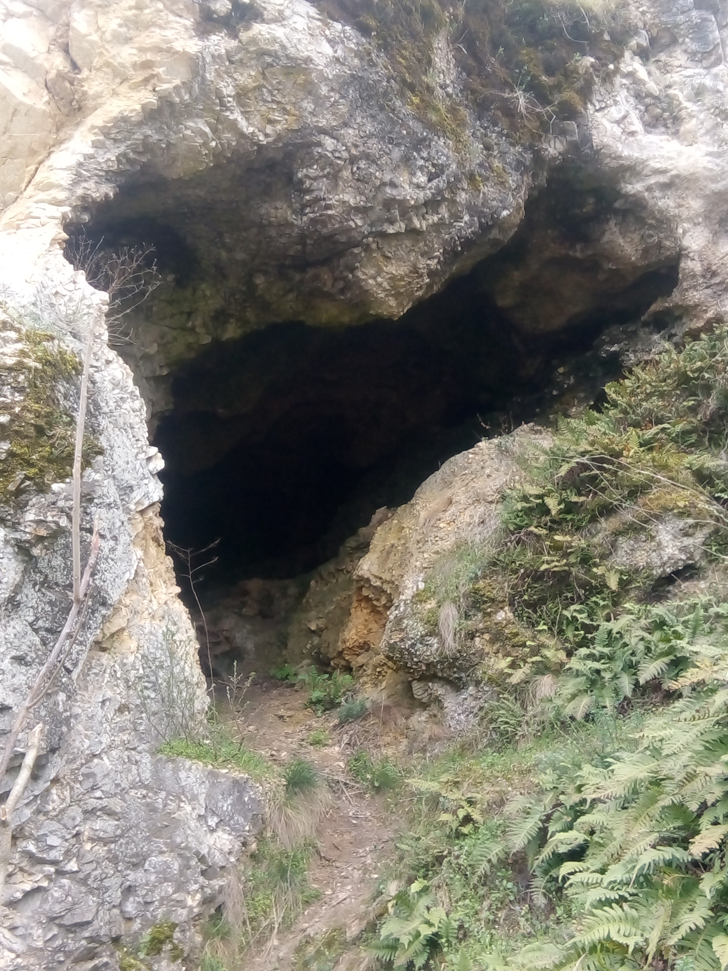 Ulaz u pećinu Gradac